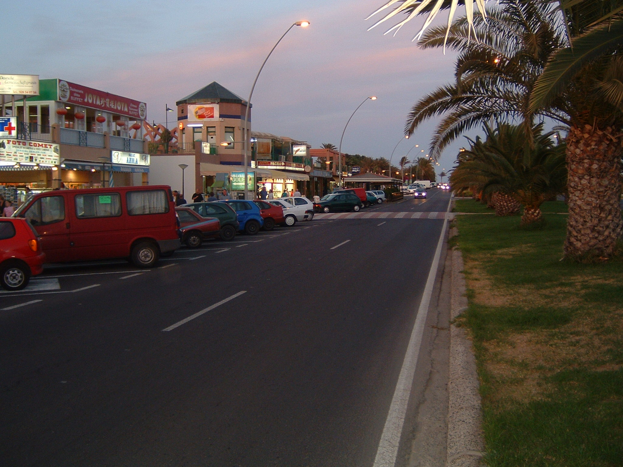 Jandia